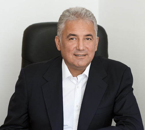 Adriean Videnau